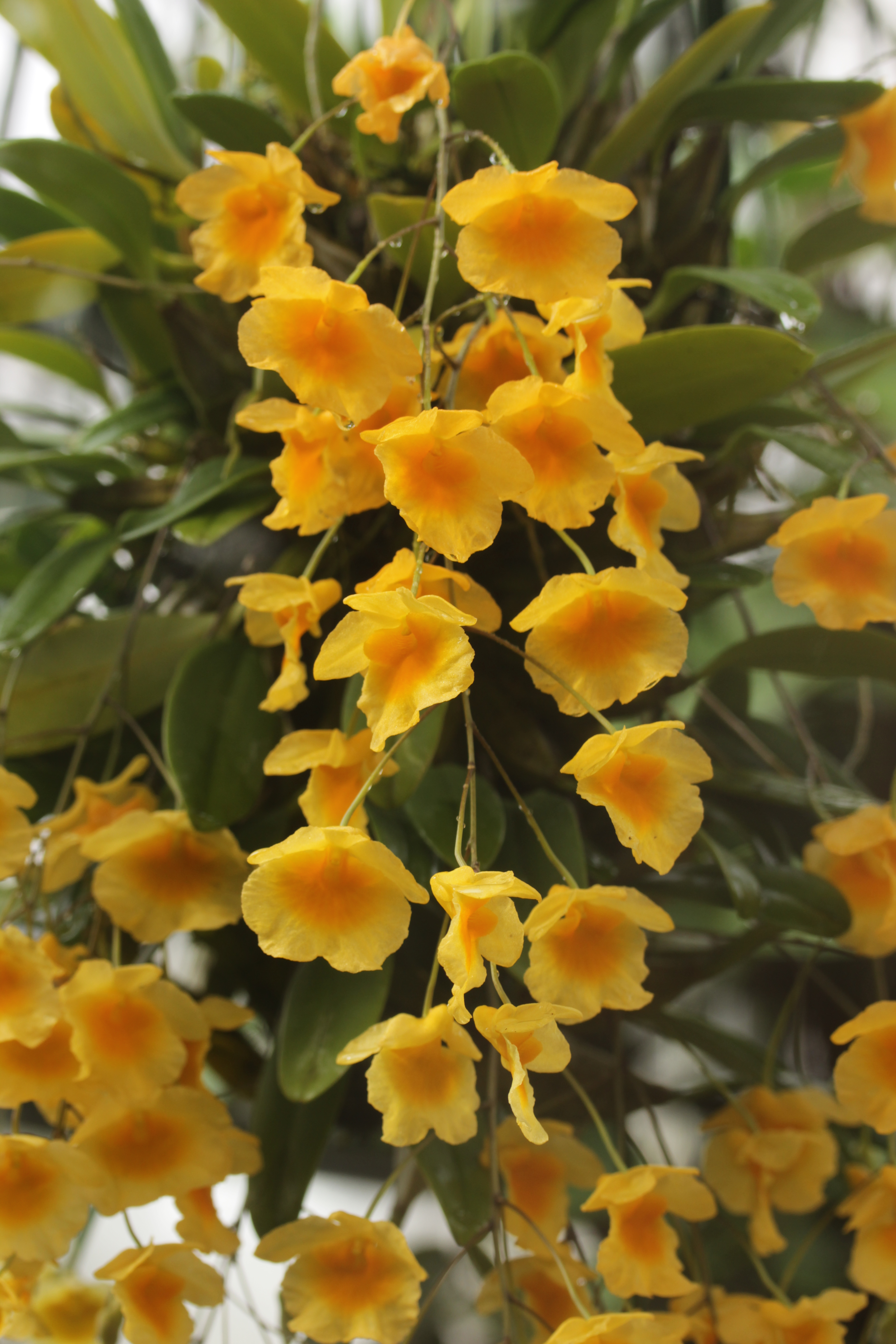 Lindley's dendrobium - Dendrobium lindleyi